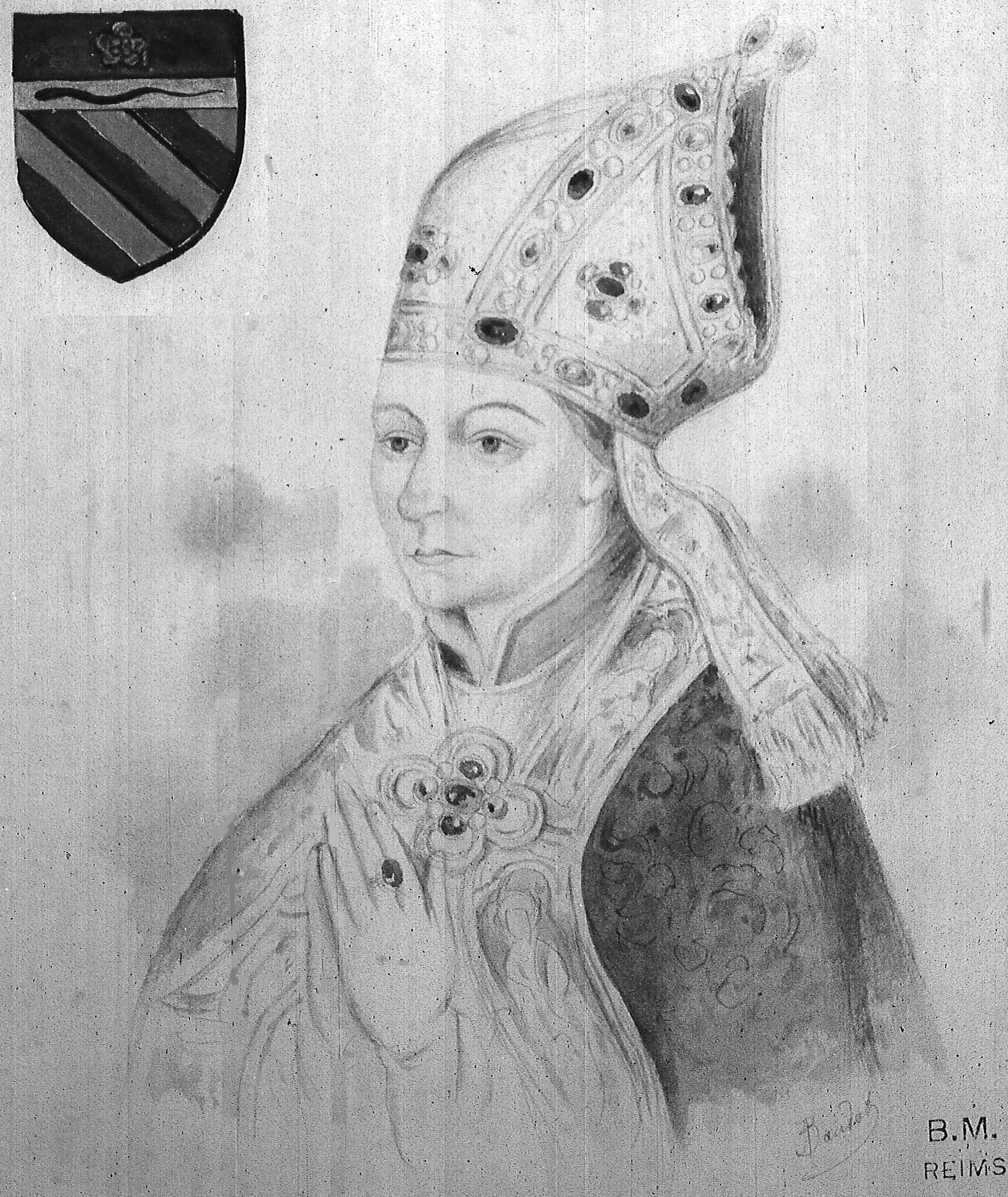 issu de la bibliothèque carnegie de reims.